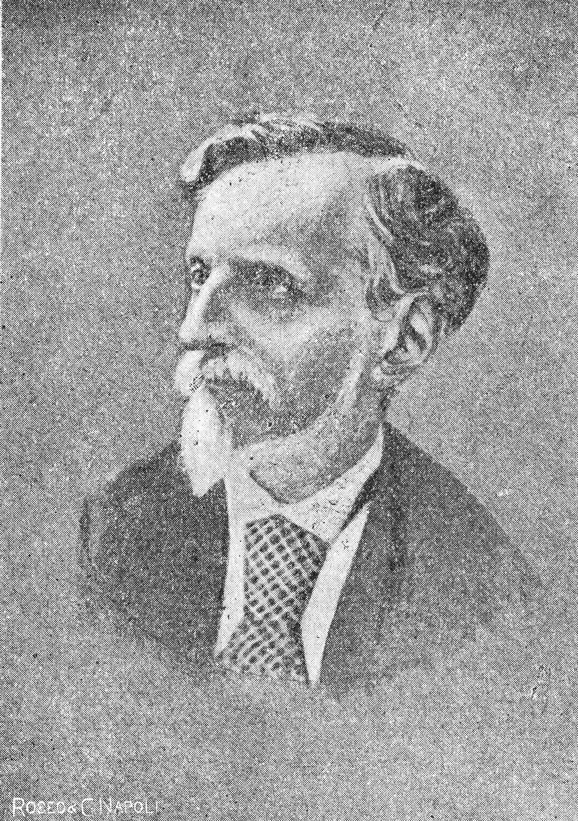 Foto del 1874 di Vincenzo Cesati (Botanico, 1806-1883).